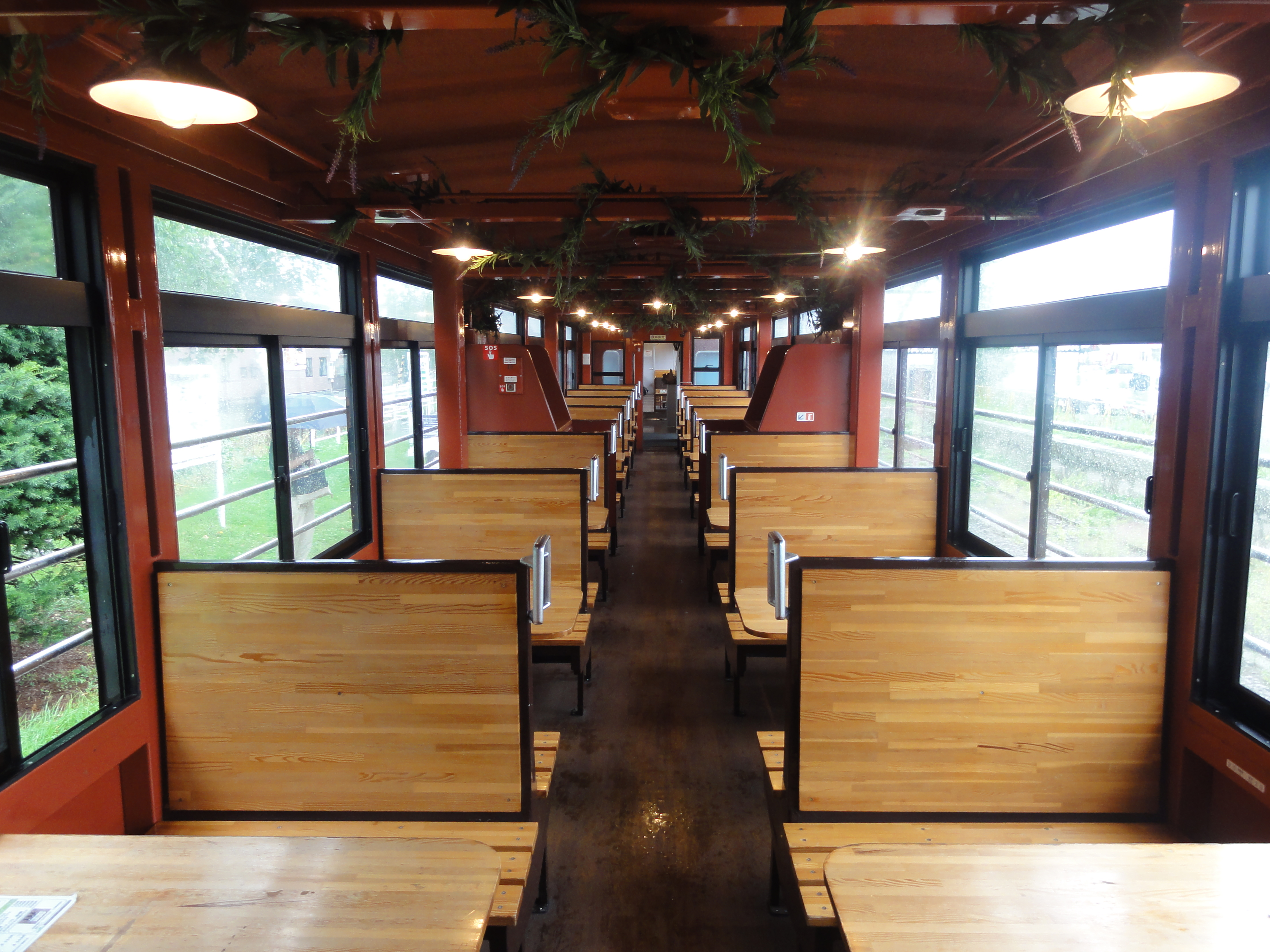 ナハ29003・車内